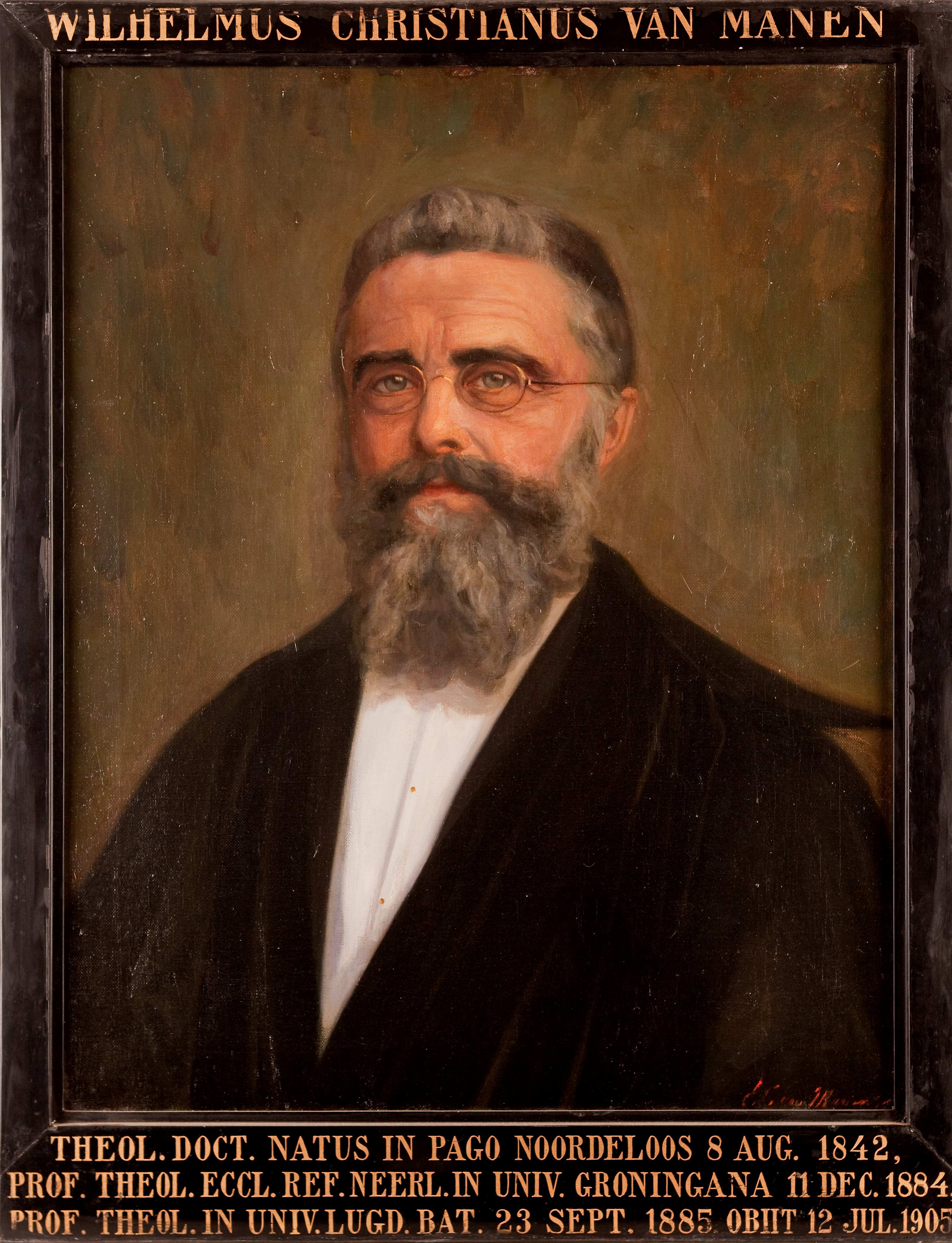 Leids hooglerarenportret van Willem Christiaan van Manen (1842-1905), 1915, Bijzondere Collecties Universiteitsbibliotheek Leiden, Icones Leidenses 290